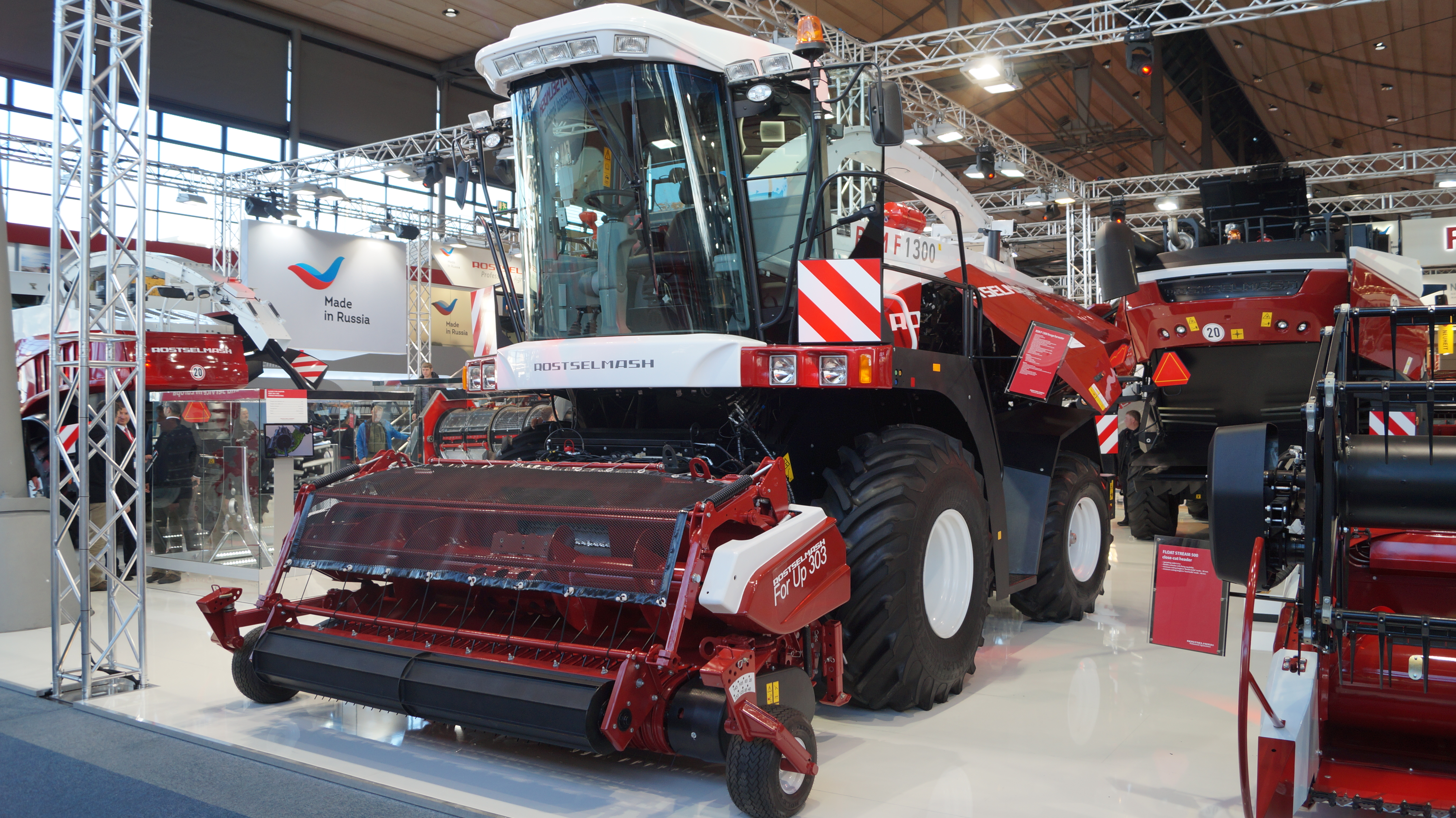 Schrägansicht der Front eines Rostselmash RSM F 1300, ausgestellt auf der Agritechnica 2017.